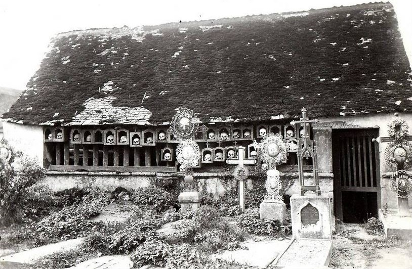 L'ossuaire de Noyal-Pontivy au début du XXe siècle avec ses alignements de boites contenant des crânes humains (carte postale A. Waron)